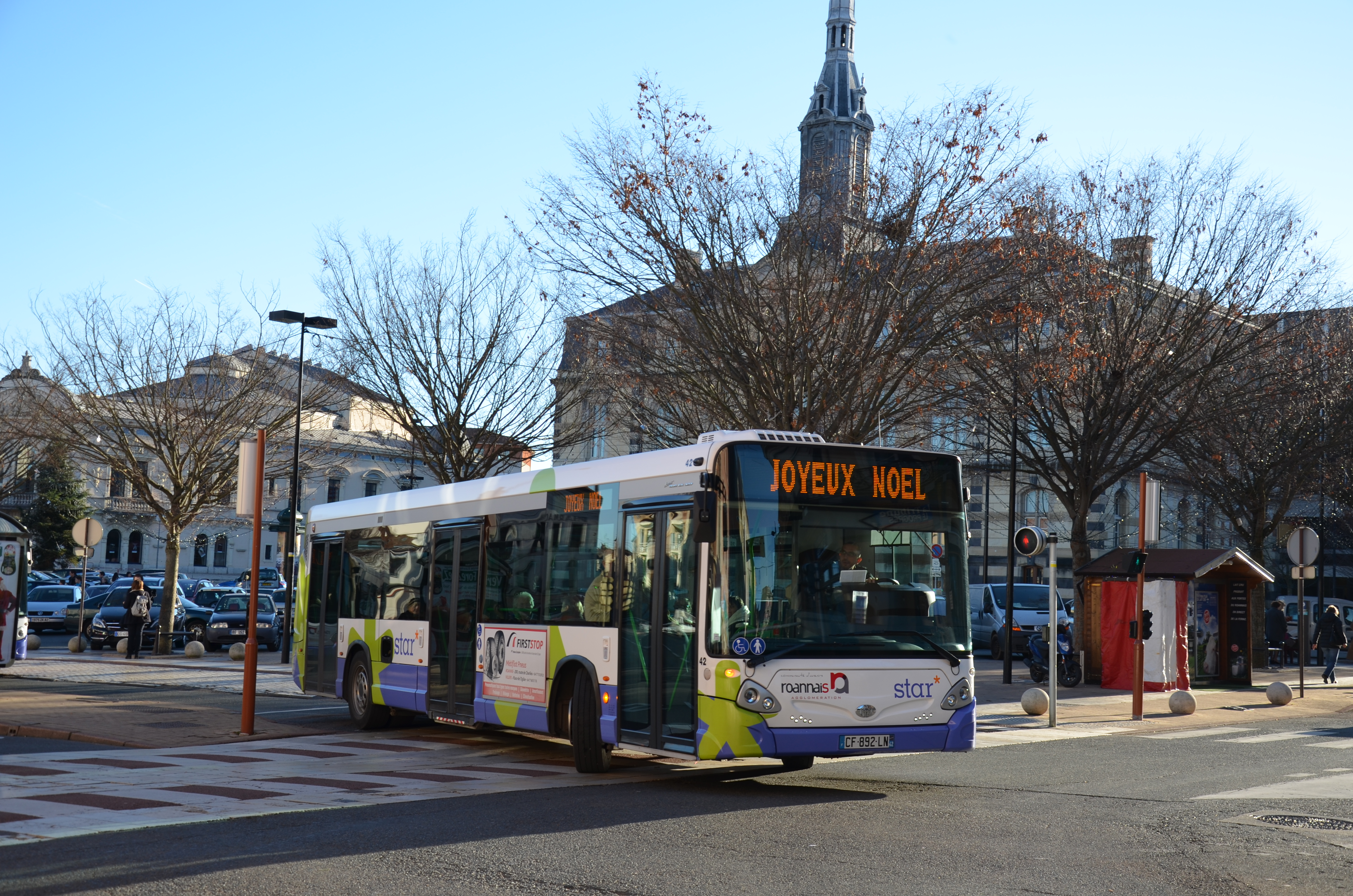 Heuliez GX 327 n°42 sur la ligne 3 du réseau STAR de Roanne, à la gare routière d'Hôtel de Ville.